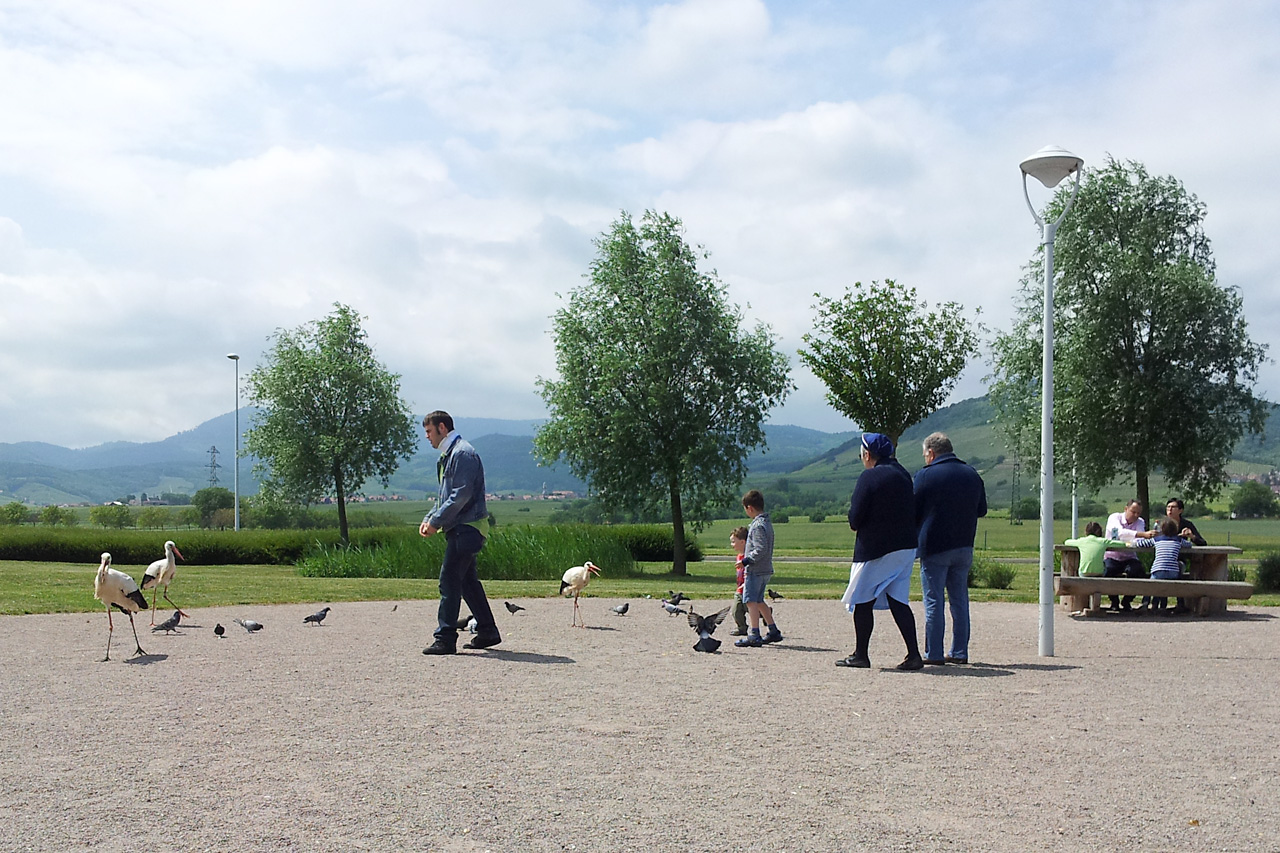 Störche auf der Raststätte "aire de service du Haut-Koenigsbourg"